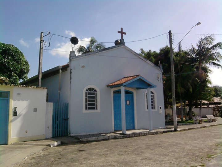 Igreja de Nossa Senhora da Conceição no bairro Icapara, em Iguape / SP